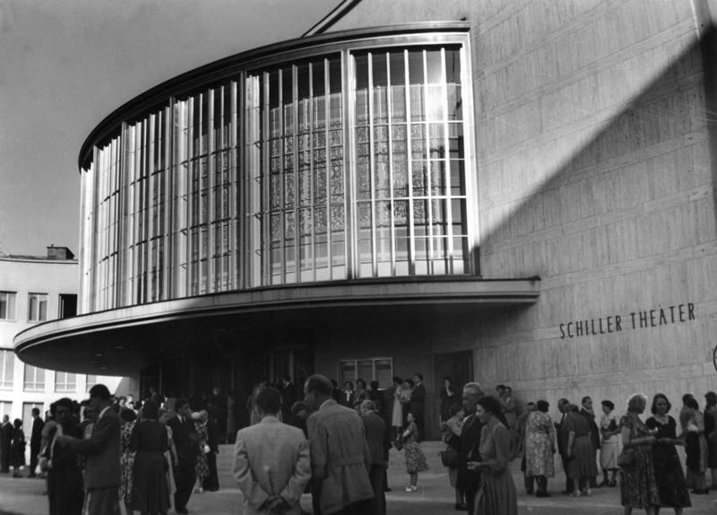 August 1953 Pause im Schiller-Theater in Berlin-Charlottenburg